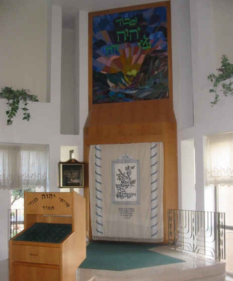 Ark in Rahamei Tirtzah synagogue